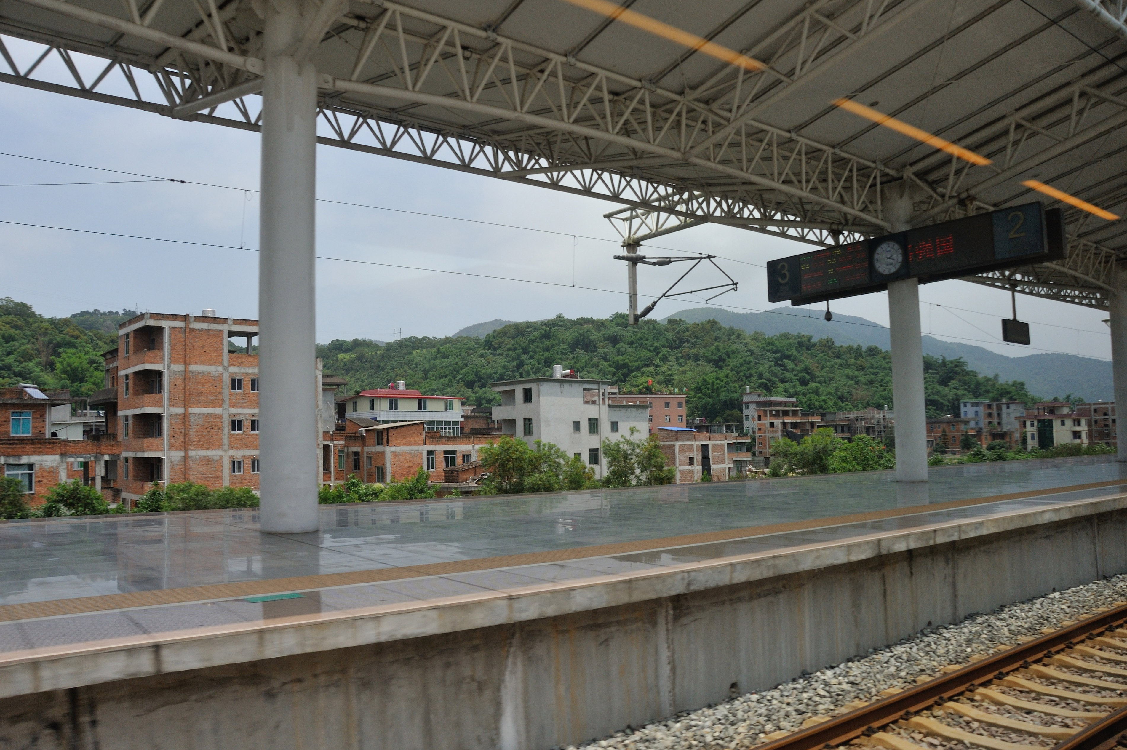 连江站站台